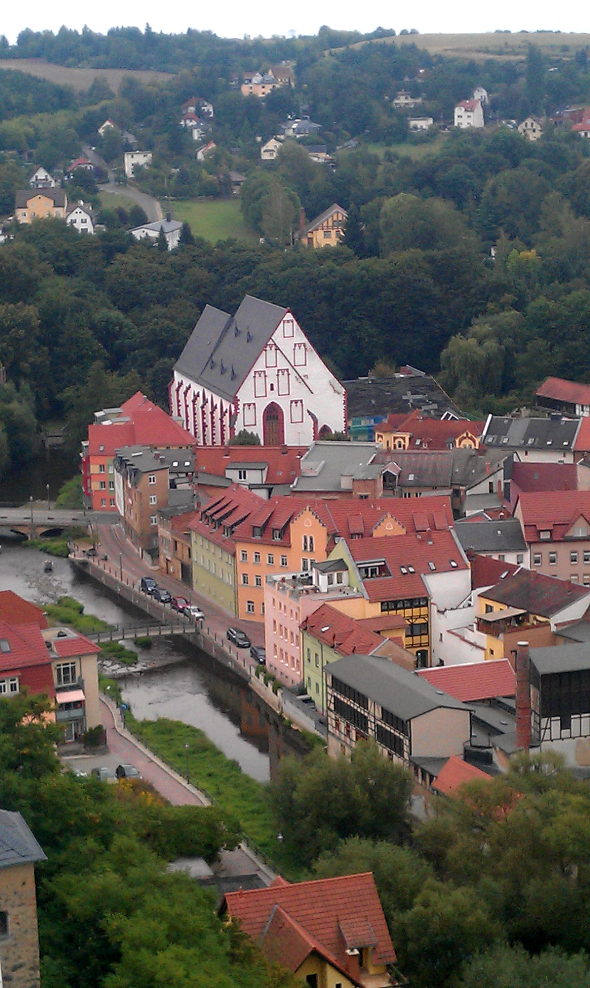 Altstadtansicht vom Burgturm